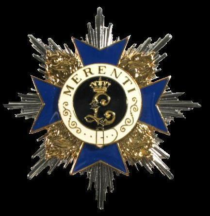 Scan van een zilveren ster in mijn verzameling , bewerkt met paint